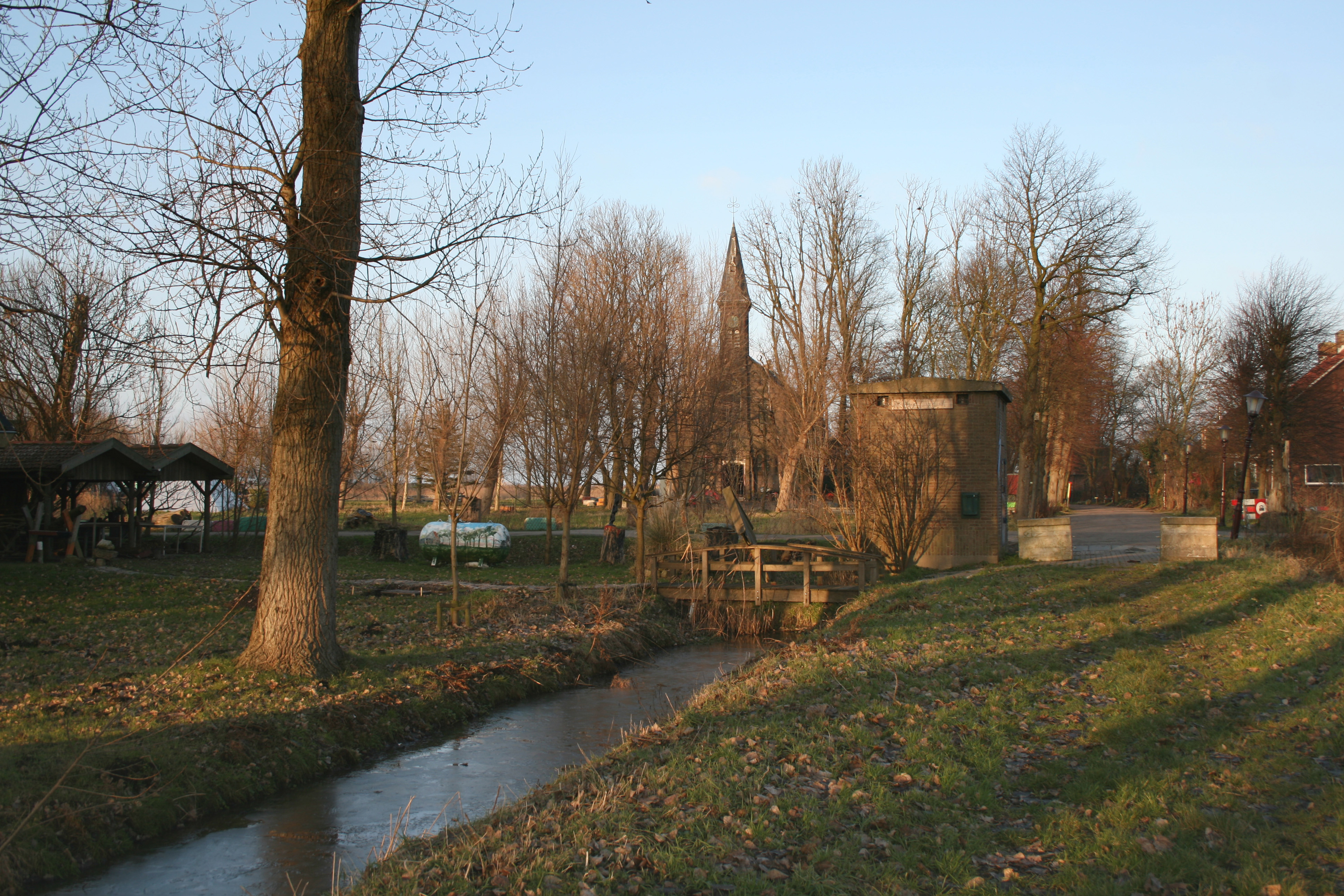 Ruigoord, Amsterdam.